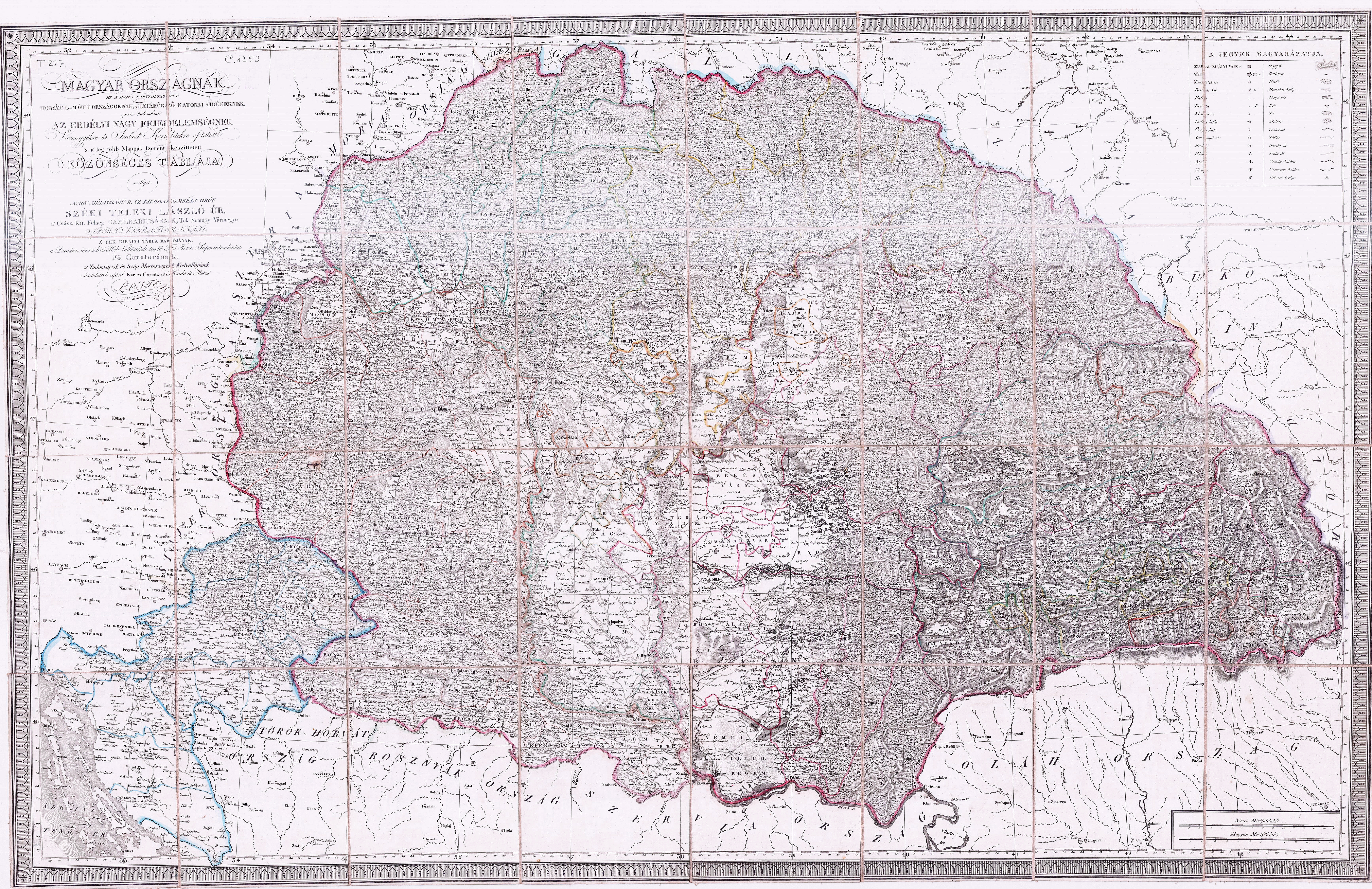 Karacs Ferenc Magyarország térképe 1830 körül